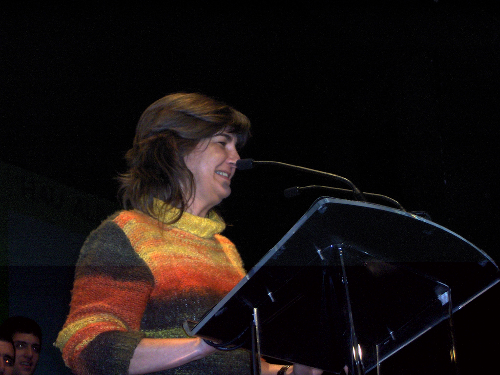 2007ko apirilaren 26an Getxoko ezker abertzaleak Algortako Getxo Antzokian egindako ekitaldi politikoa.